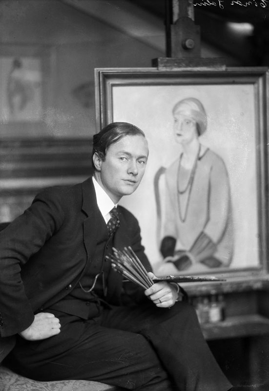 Porträtt av konstnären Einar Jolin, taget någon gång mellan 1925-1941. Bildnummer JdM 1184 Unikt dokument ID SSMJDM001184 Uppladdat från Stockholms Stad, Digitala Stadsmuseet